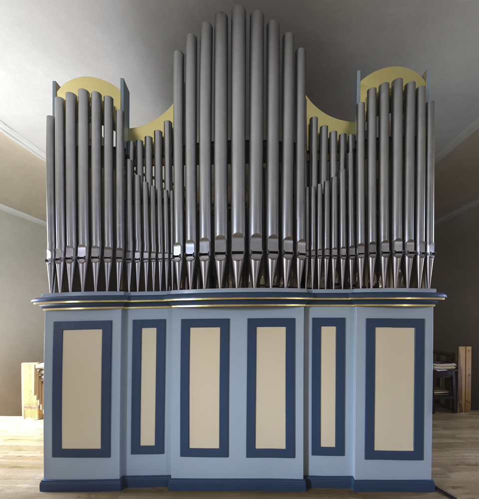 Hey-Orgel der St. Laurentius-Kirche in Alzenau-Michelbach